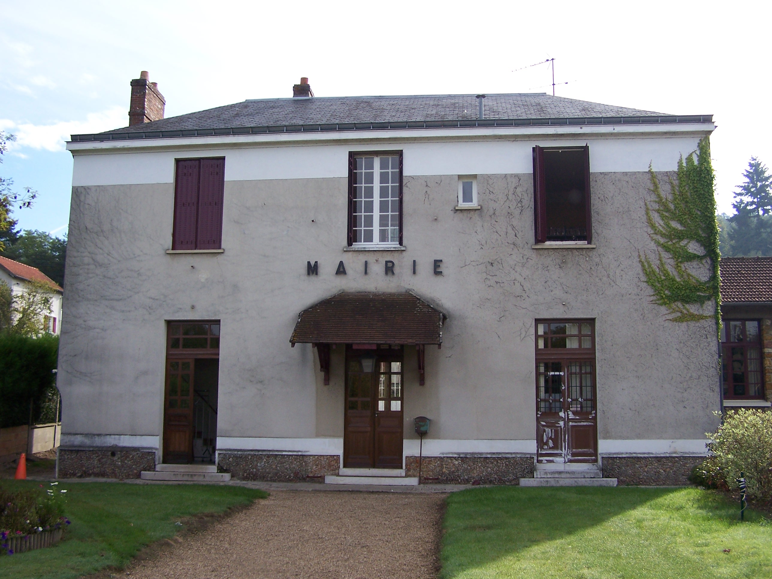 Mairie de Senlisse (Yvelines, France)